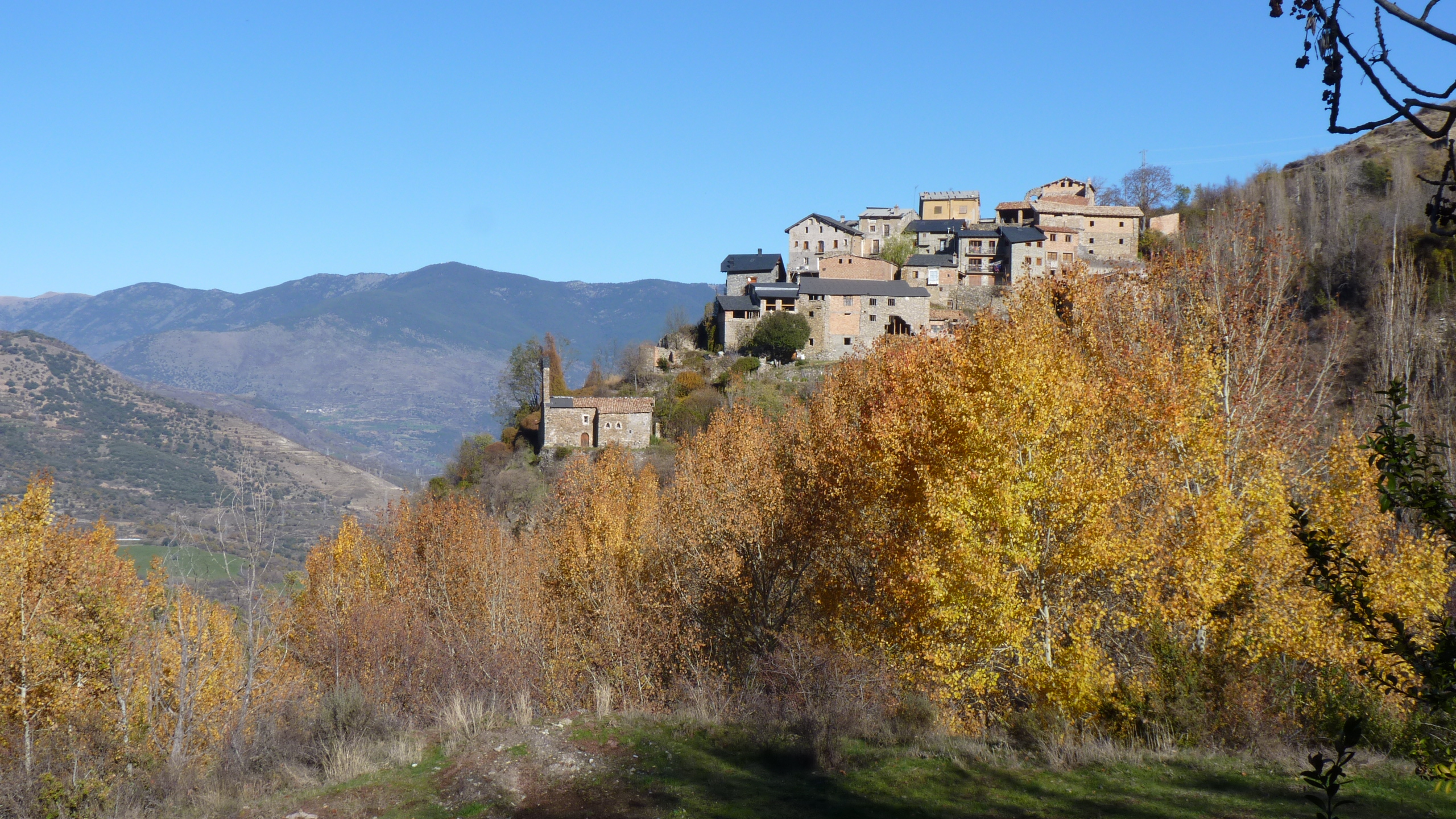 vista del poble de malmercat